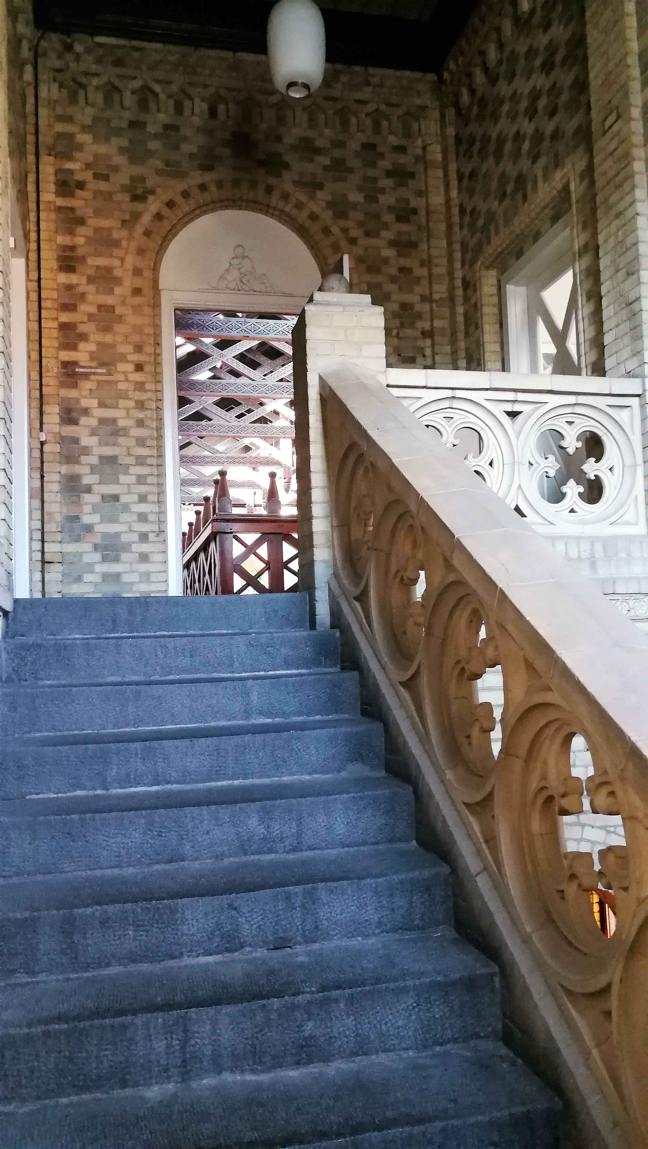 Bygningskulturens Hus